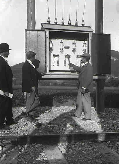 BTB Schaltposten der BTB für Drehstrom Oberdiessbach/Brenzikofen